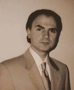 Dejan Stojanović, Chicago, 2000